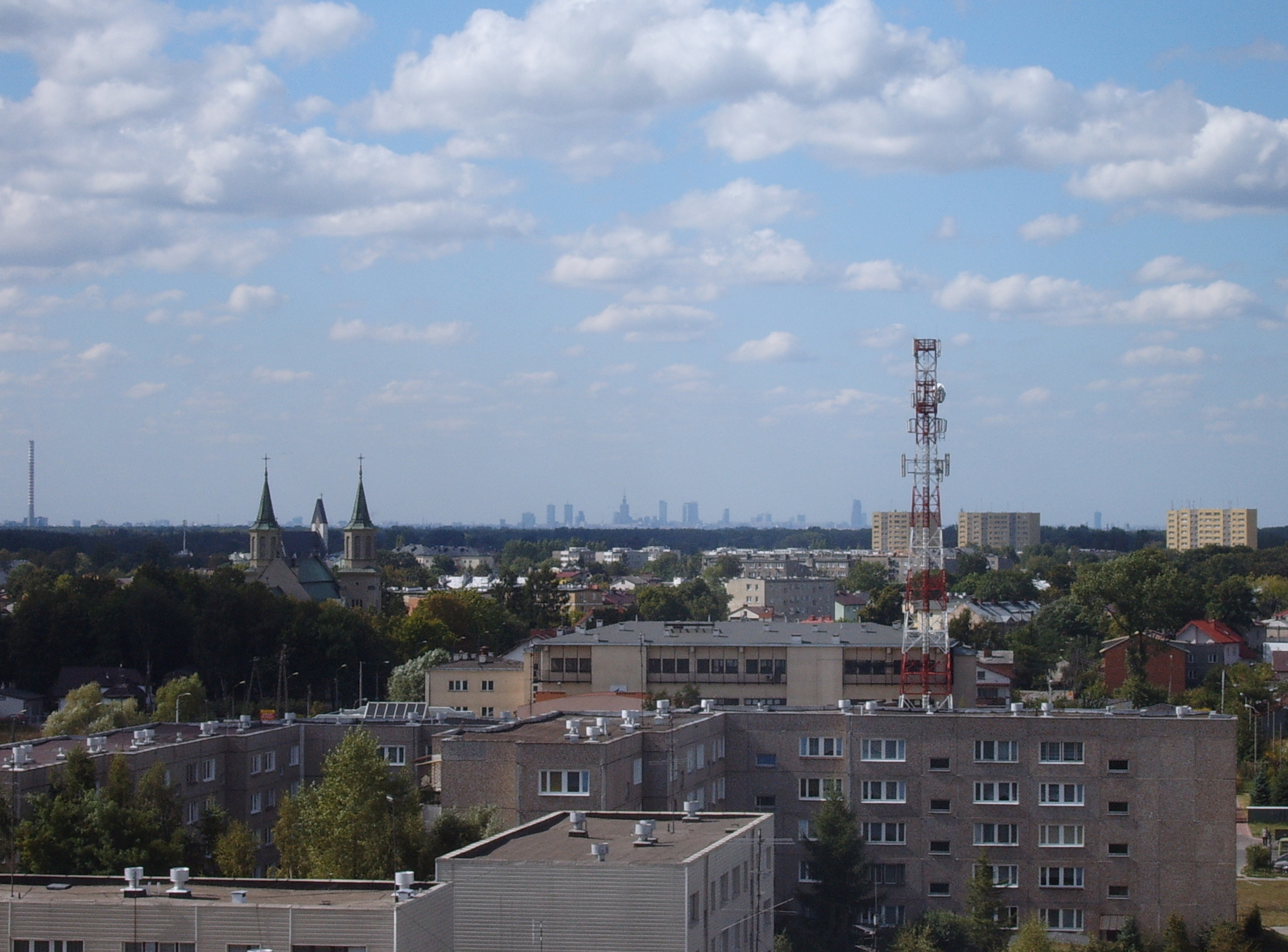 Panorama Wołomina